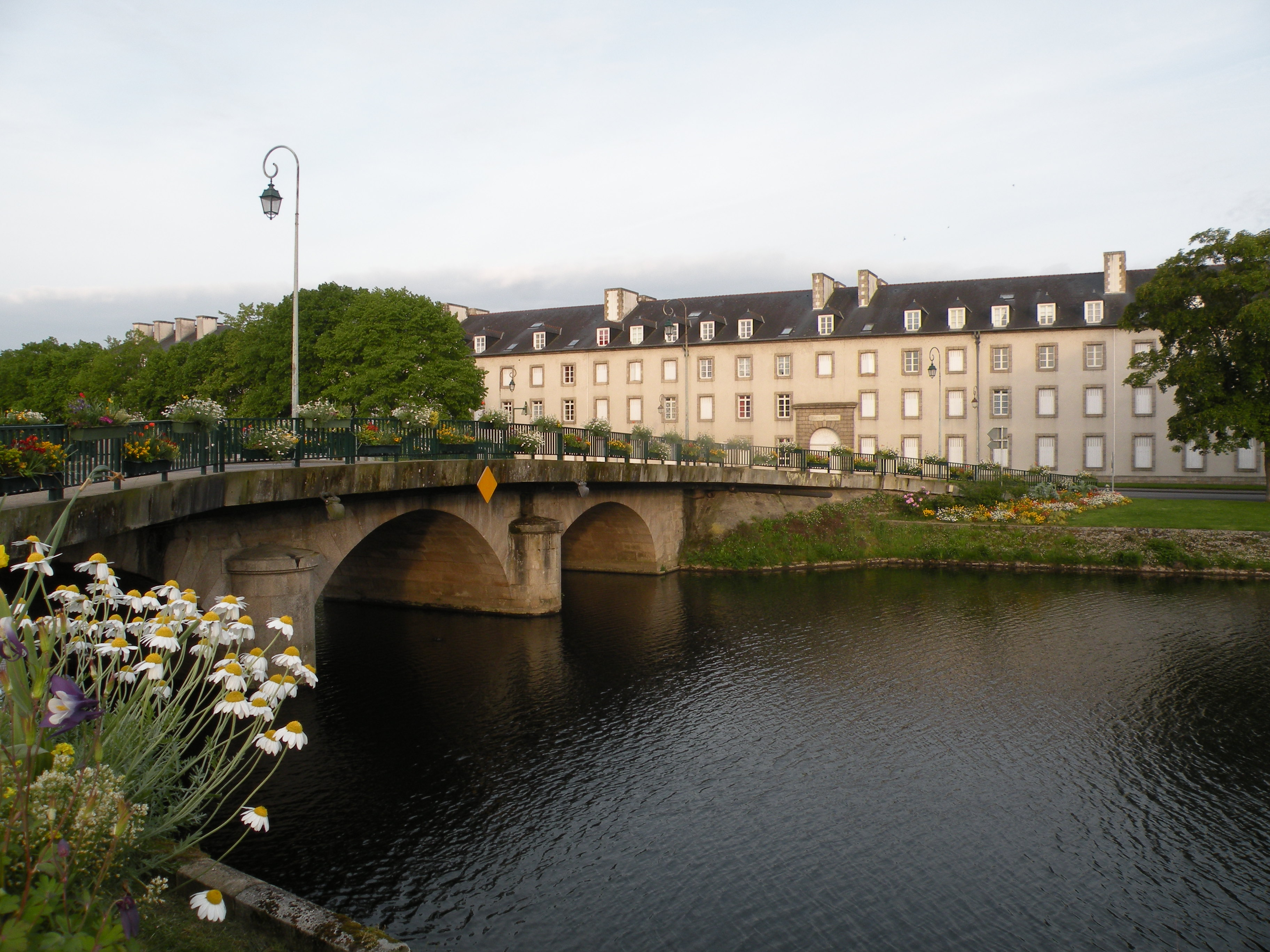 Pont à Pontivy devant la caserne Clisson (inscrite MH) .